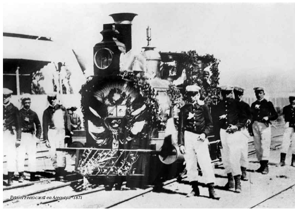 Inauguracion del tren